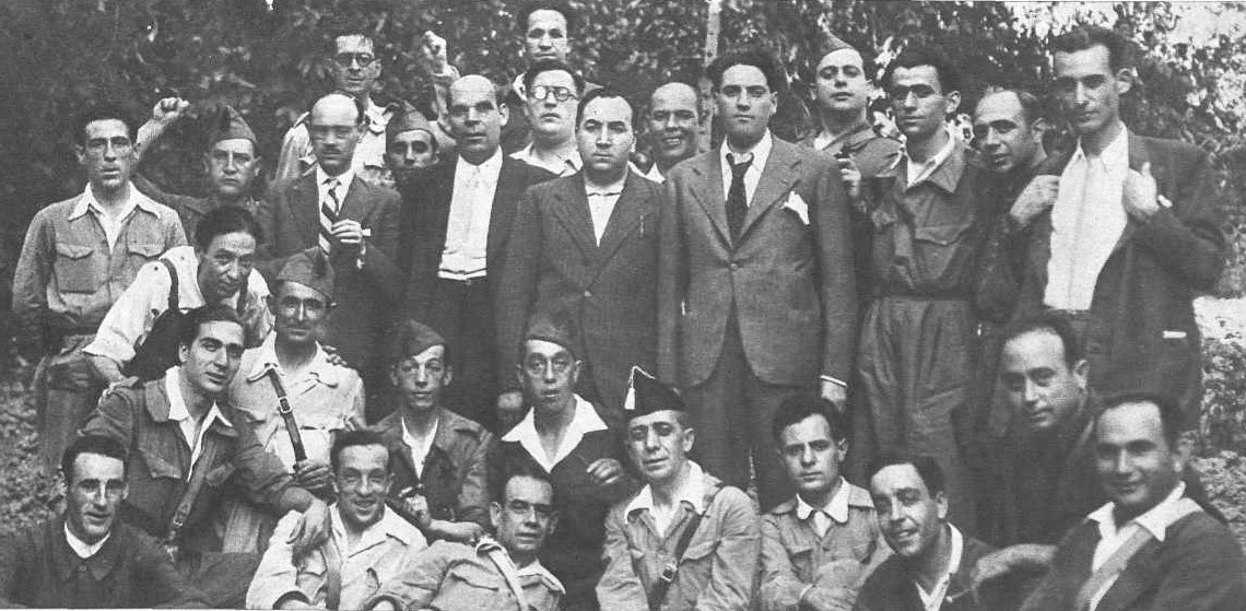 Los diputados socialistas Lamoneda, Anastasio de Gracia, Bujeda y Alvar, con el director de las Milicias de Investigación, García Atadell, y un grupo de milicianos de los que trabajan a sus órdenes.